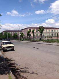 Ներսես Աշտարակեցու անվան թիվ 1 դպրոց